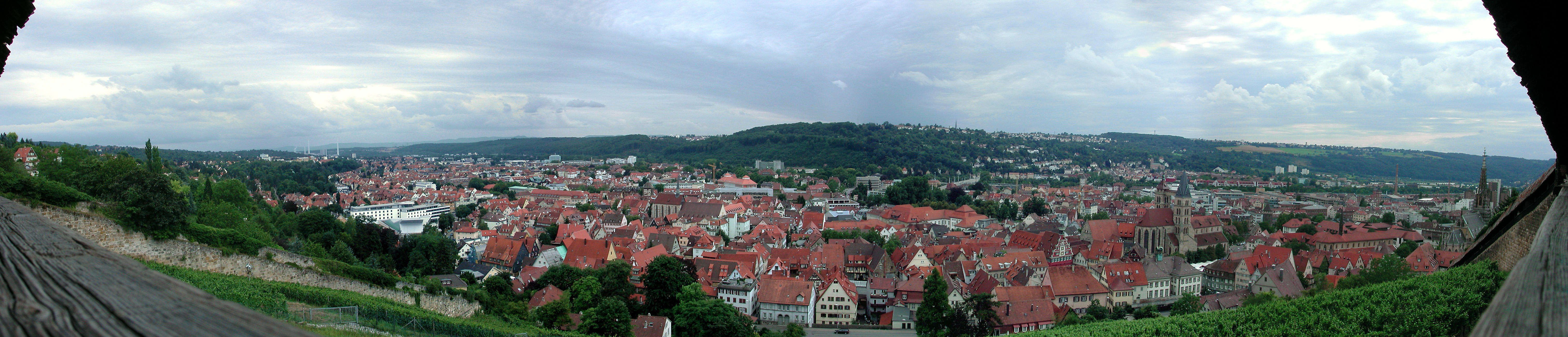 Blick von der Burg über Esslingen